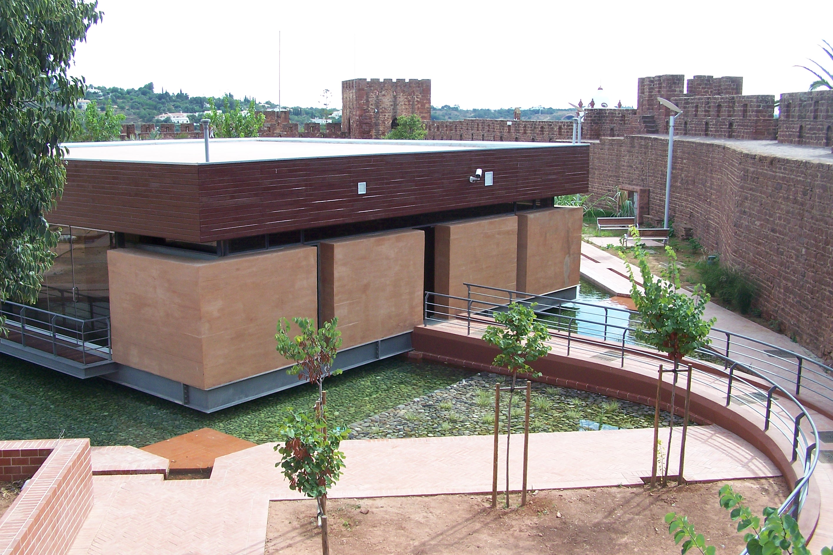 Castelo de Silves